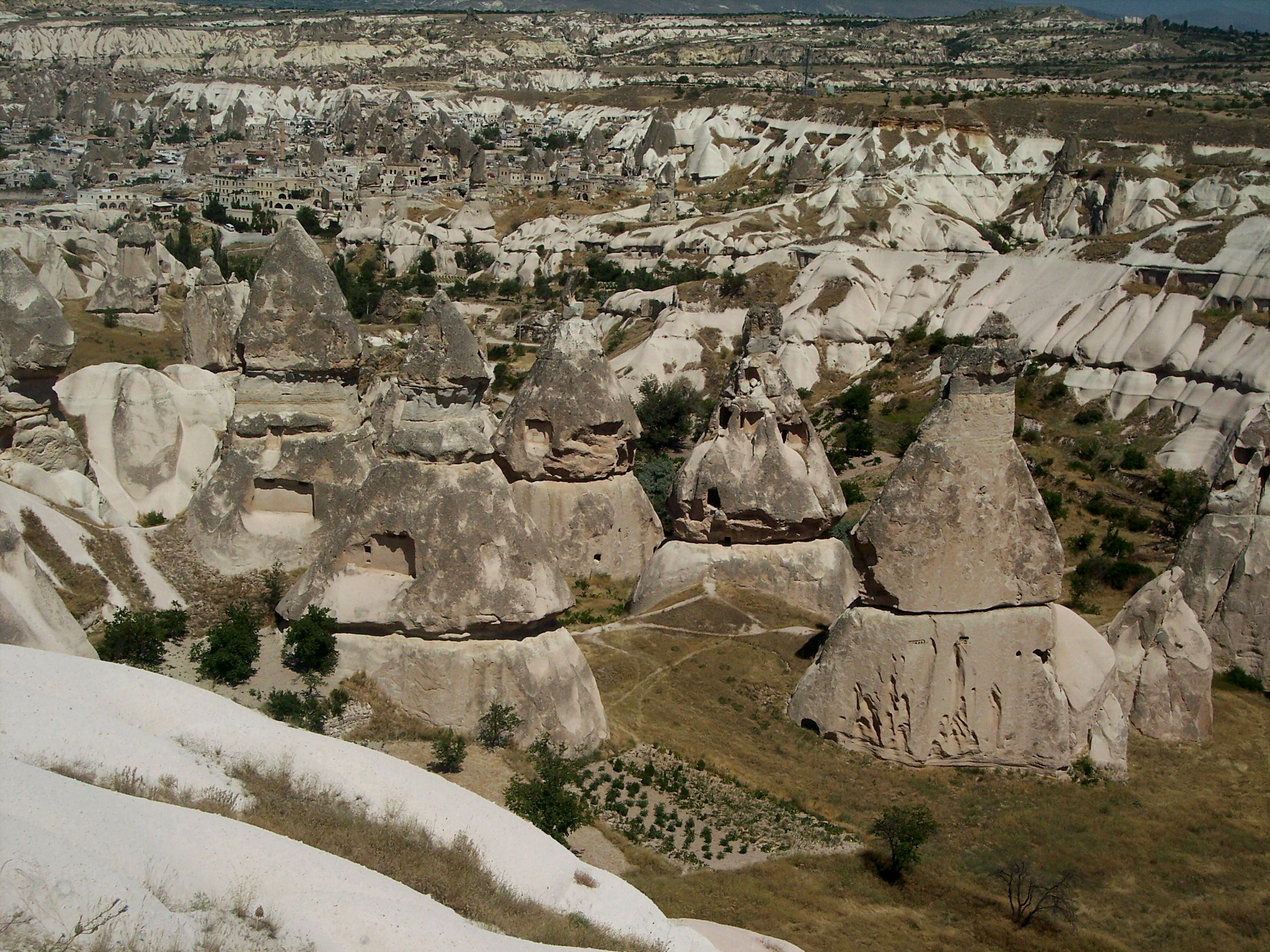 Avcılar Valley, Cappadocia, Nevşehir/Turkey.